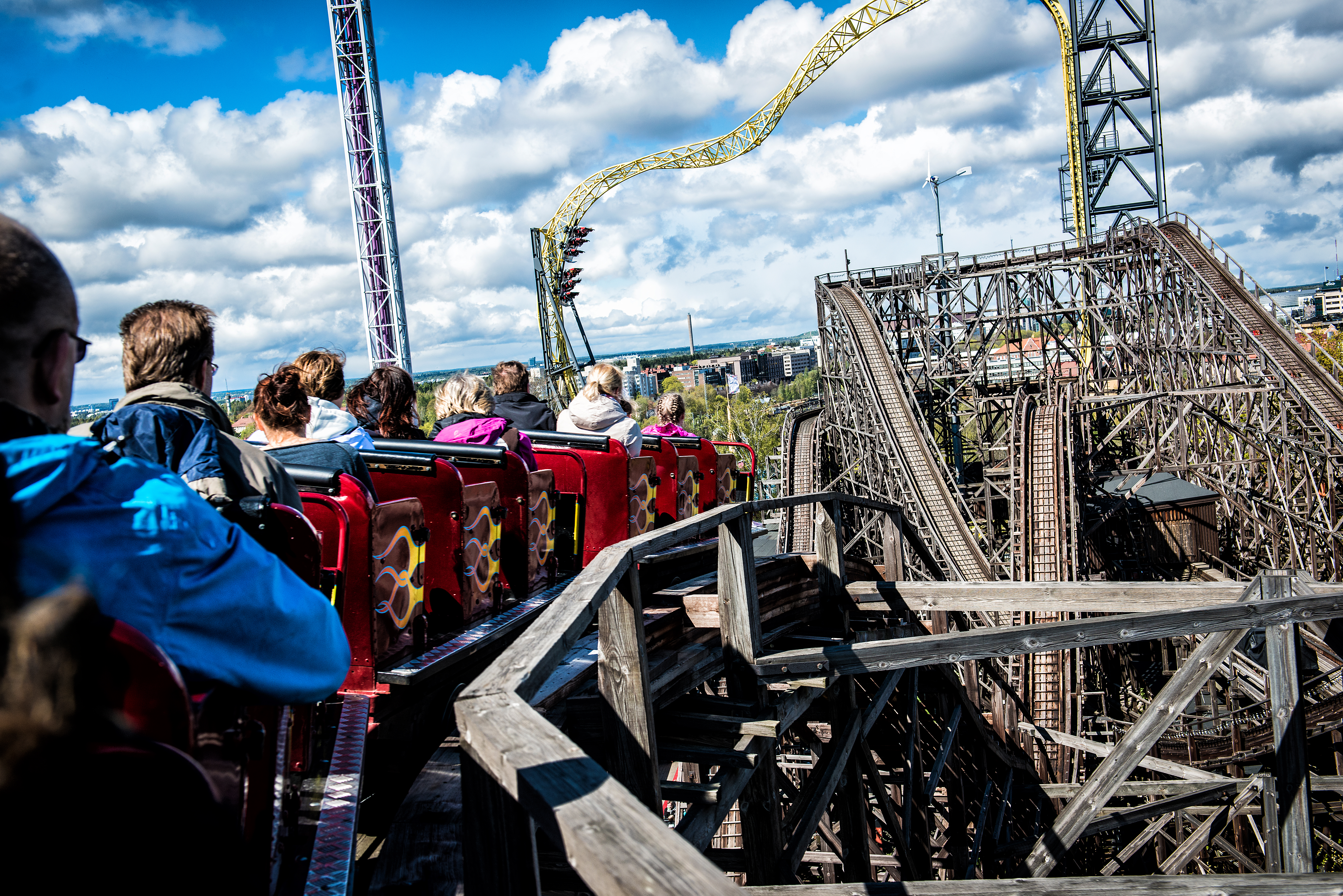 Linnanmäen Vuoristorata